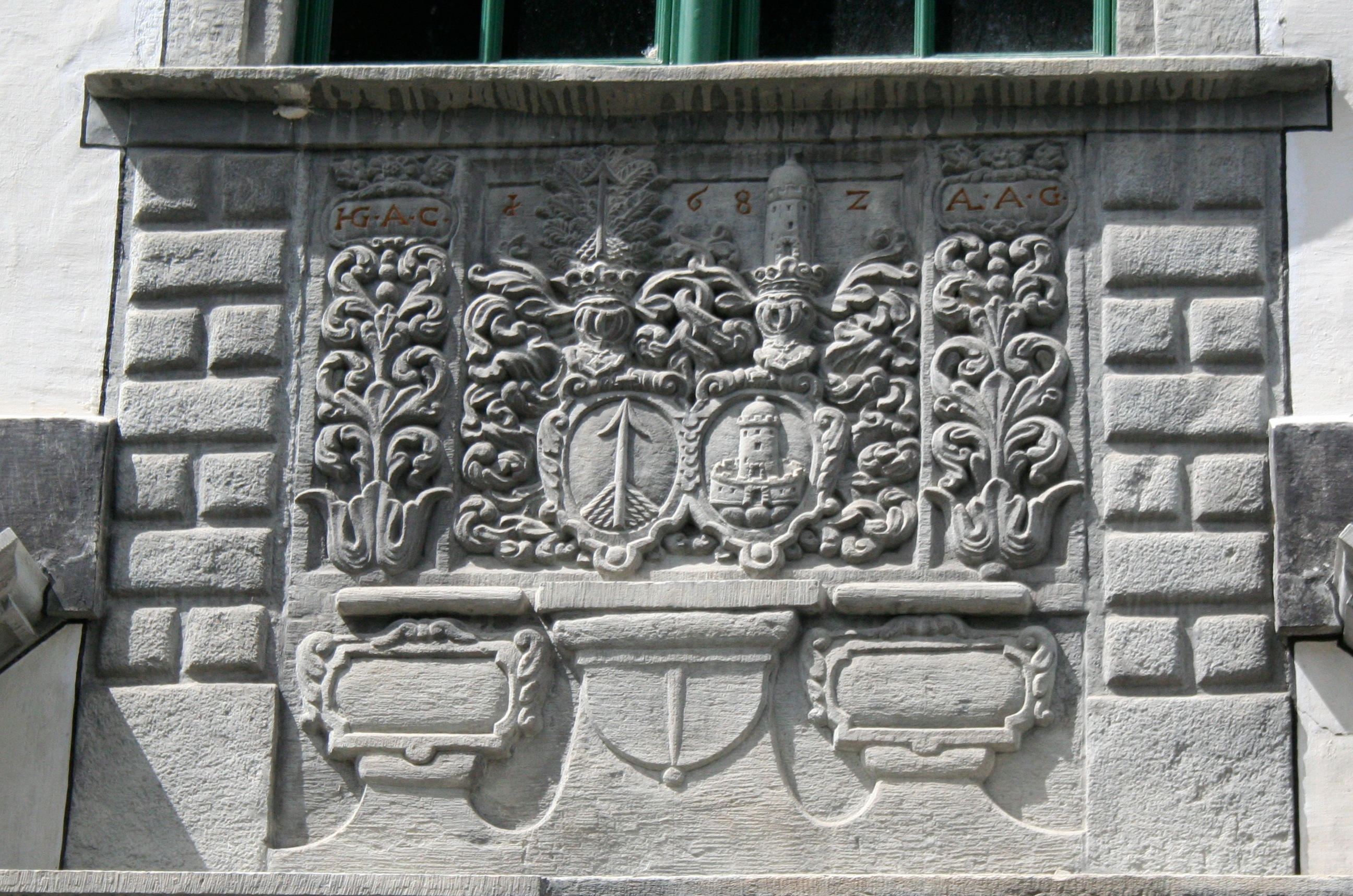 Wappen von Johann Gaudenz von Capol am Flimser Rathaus. Rechts das Wappen seiner Frau Amalie von Schorsch aus dem bekannten Splügner Geschlecht